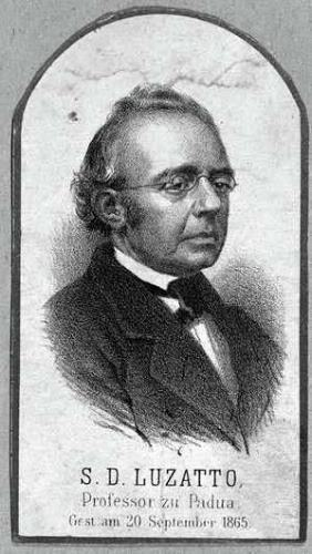 Samuel David Luzzatto, from an 1865 engraving.